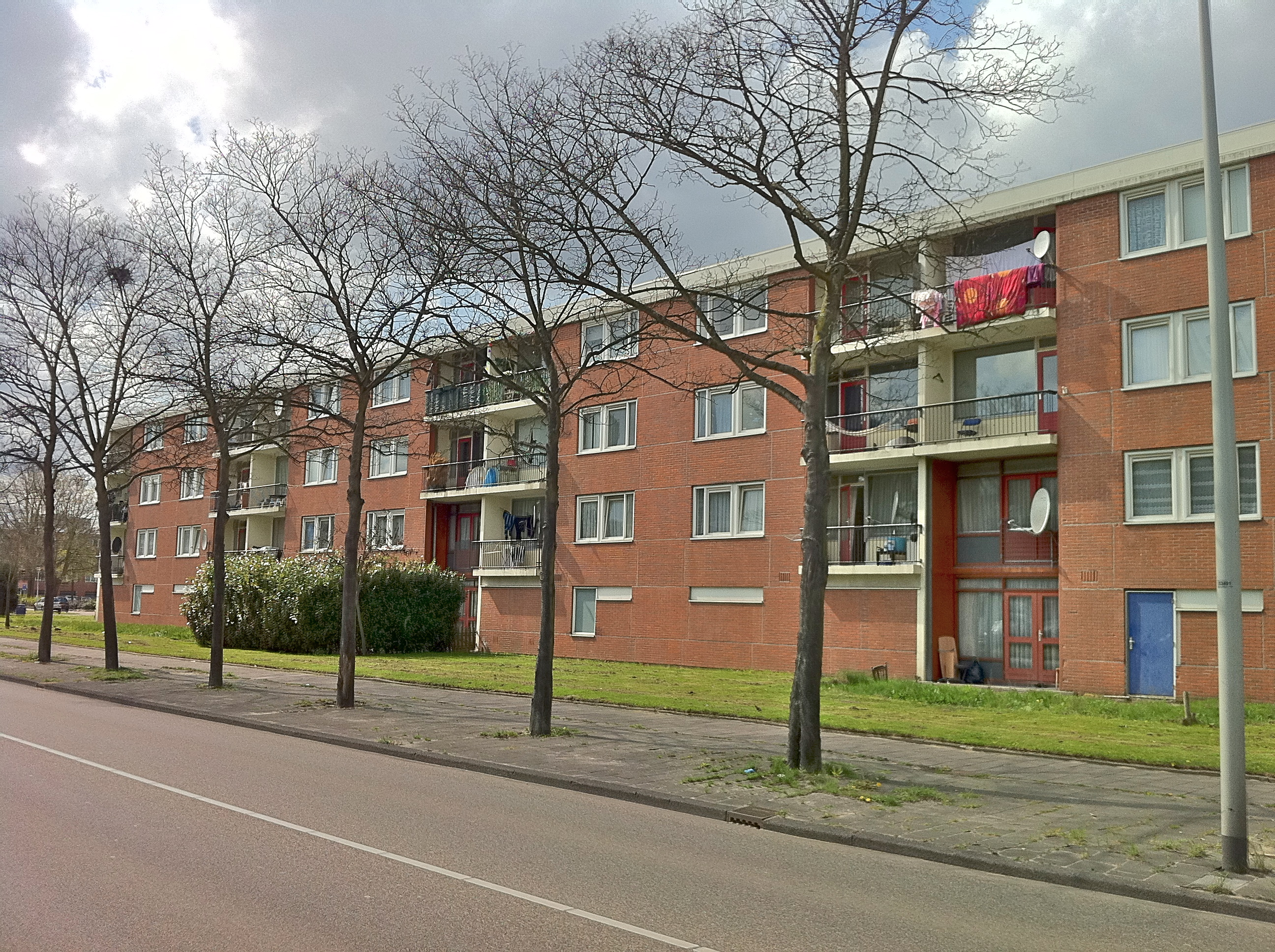 Amsterdam-Noord. Banne Buikslootlaan, complex Botterstraat